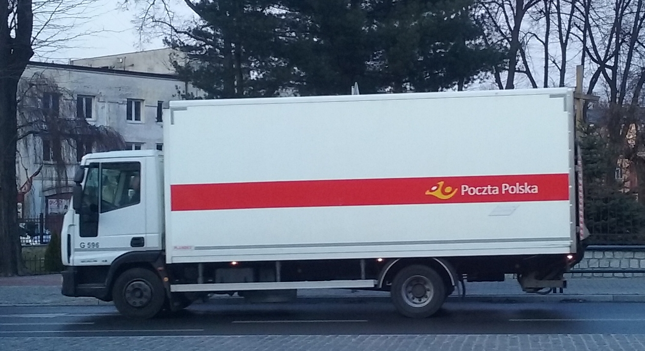 Tomaszów Mazowiecki. Samochód do przewozów międzymiastowych Poczty Polskiej.